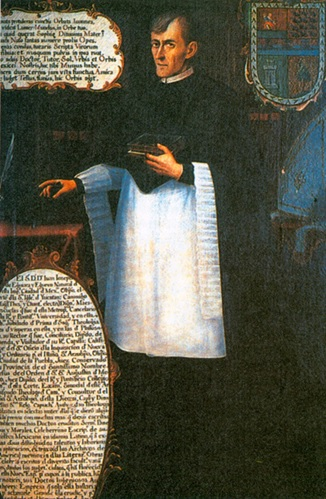 Portrait of Juan José Eguiara y Eguren (c.1696-1763)